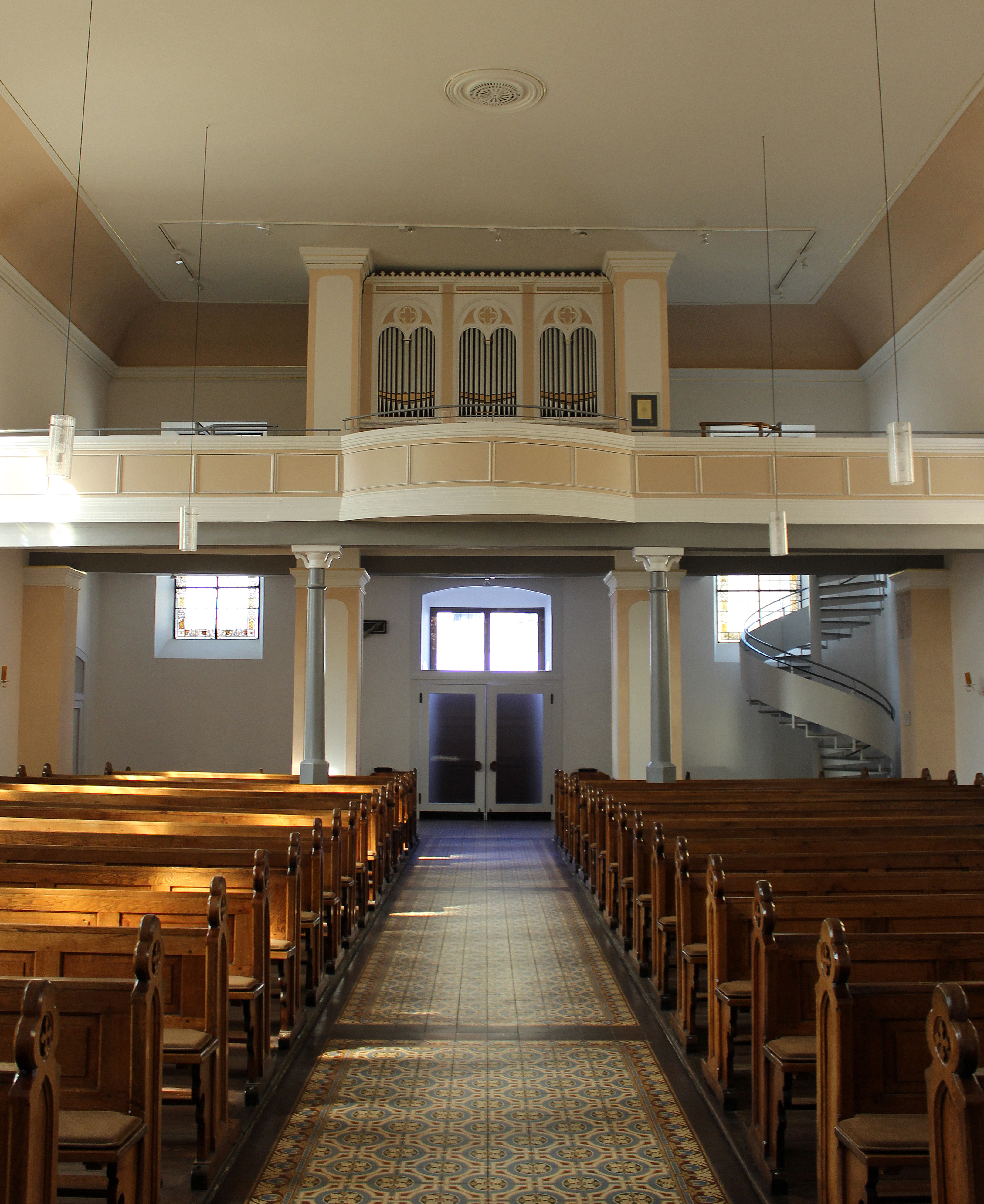 Blick ins Innere der katholischen Pfarrkirche Maria Geburt in Ottweiler, Landkreis Neunkirchen, Saarland